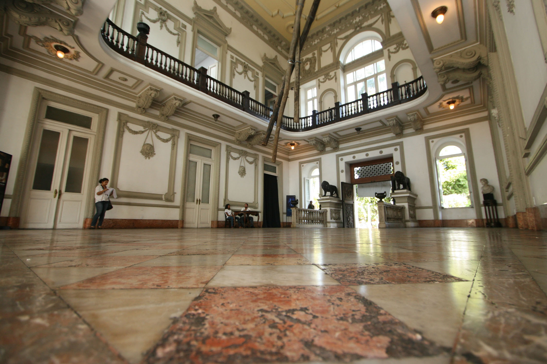 Segundo encontro baiano de Museus Na foto: Palácio da Aclamação Foto: Rafael Martins/AGECOM